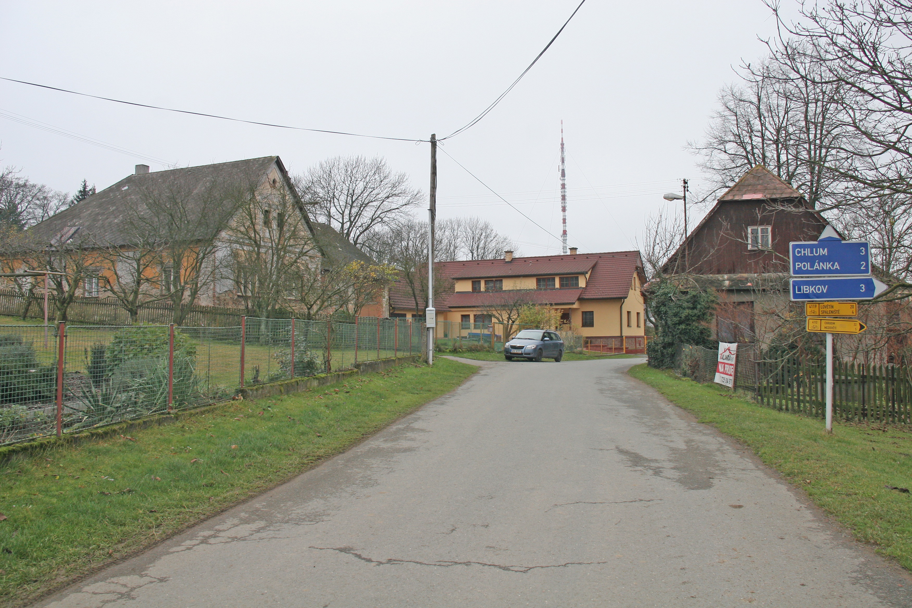 Krásné čp. 11